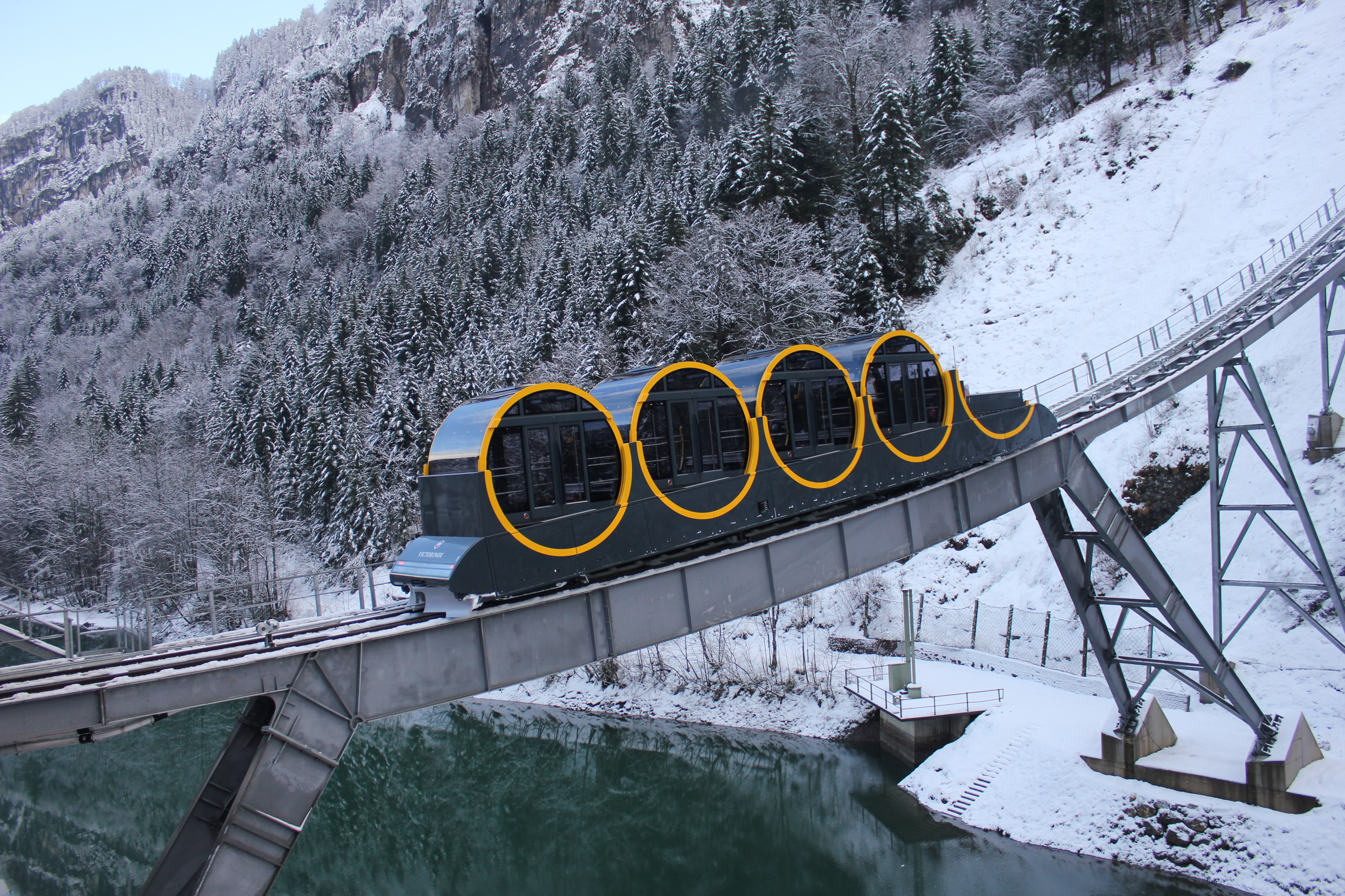 Fahrzeug der neuen Standseilbahn Schwyz-Stoos bei der Talstation